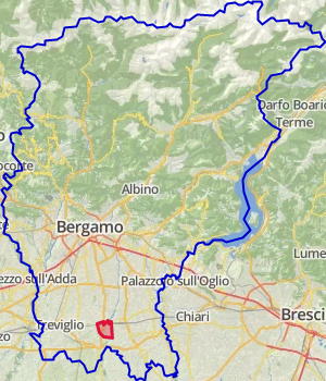 carte réalisée sur umap This map may be incomplete, and may contain errors. Don't rely solely on it for navigation.